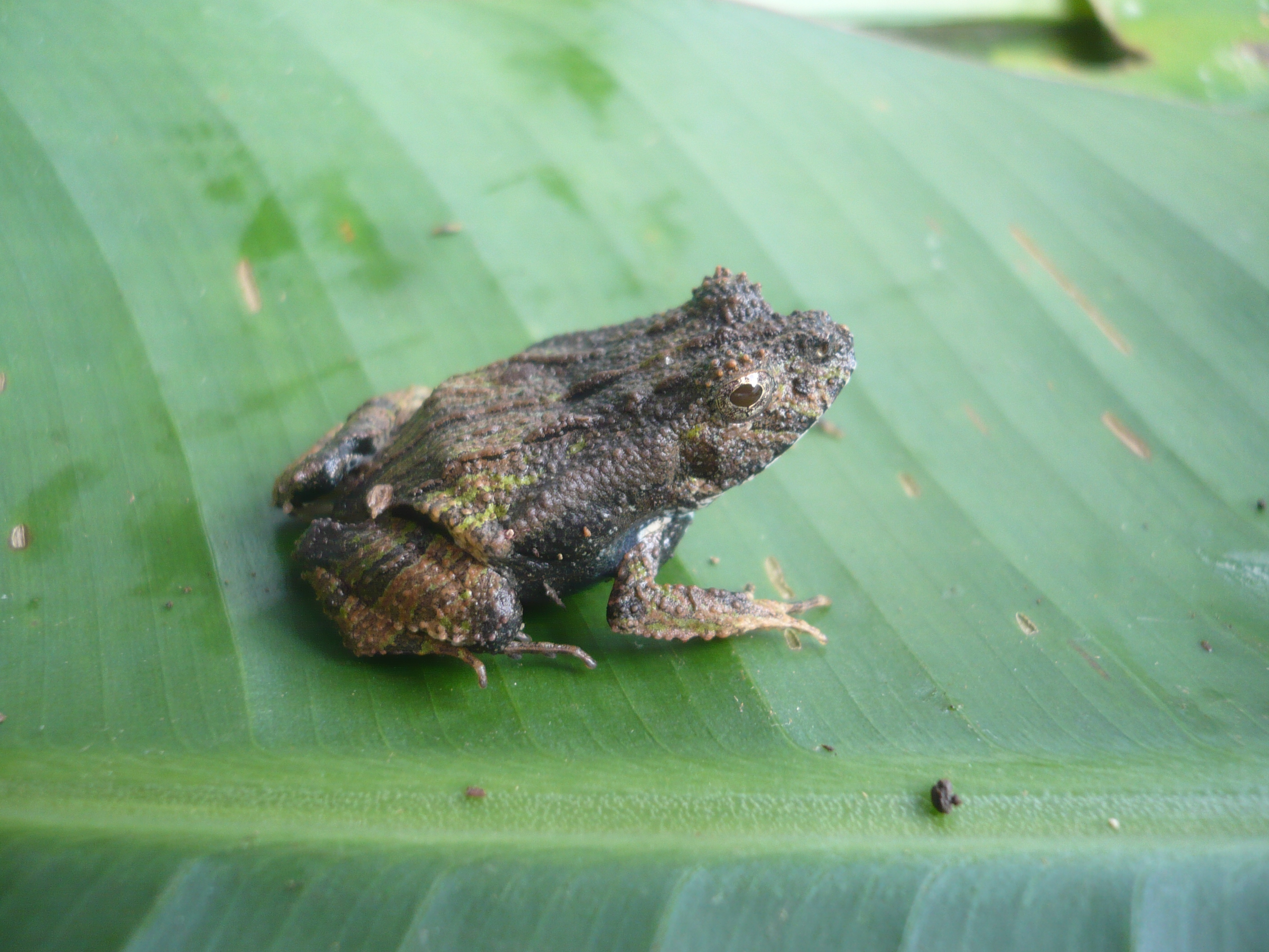 Edalorhina perezi, Parque Nacional del Manu, Madre de Dios, Perú.